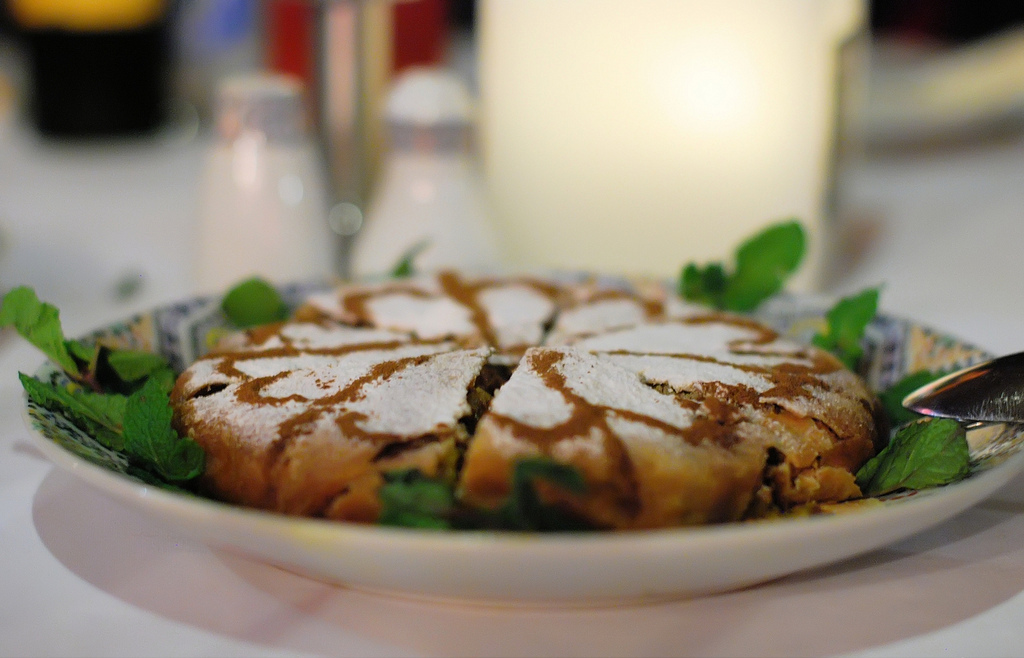 Pastilla marocaine recouverte de sucre glace